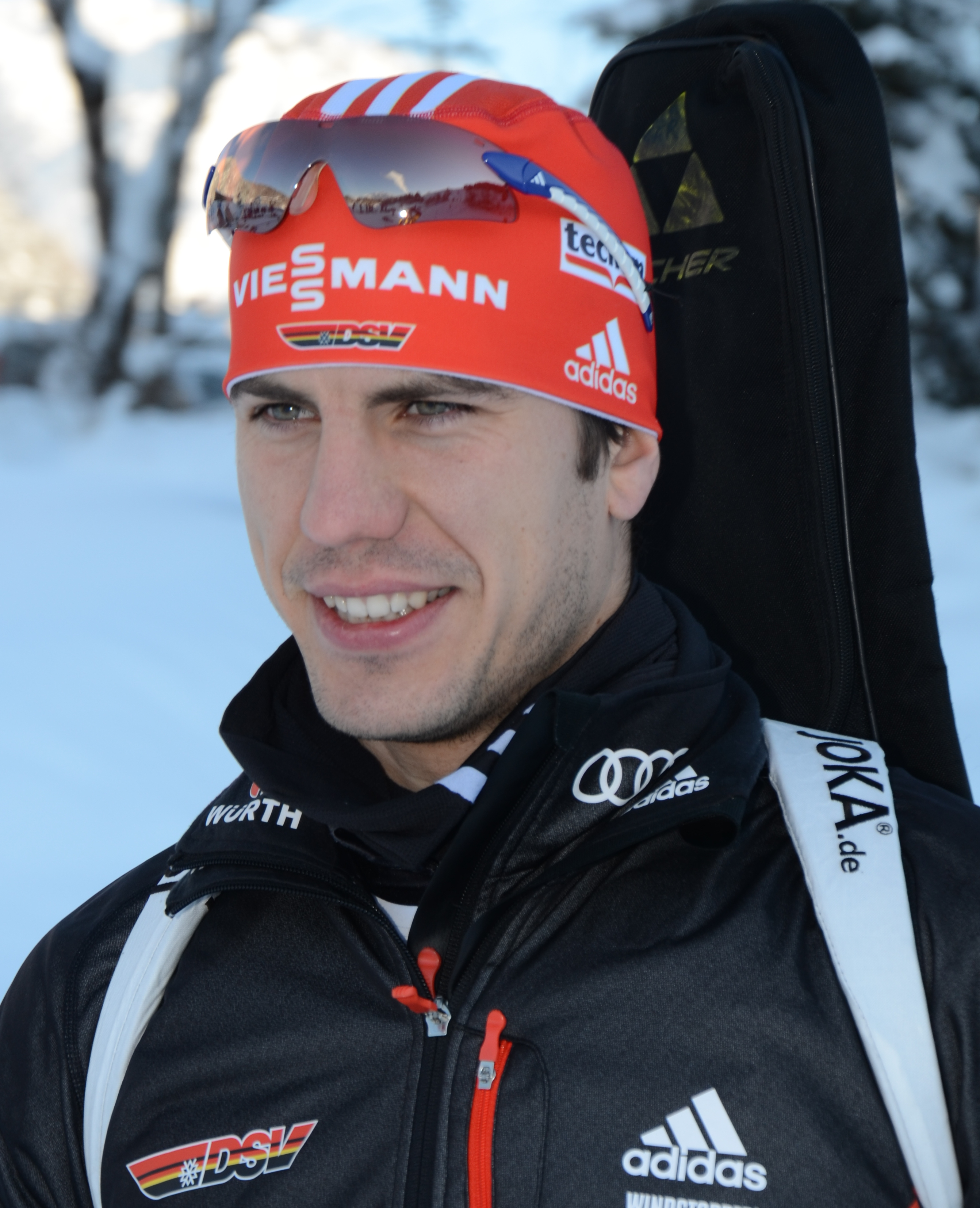 Arnd Peiffer beim Biathlon-Weltcup 2012 in Hochfilzen